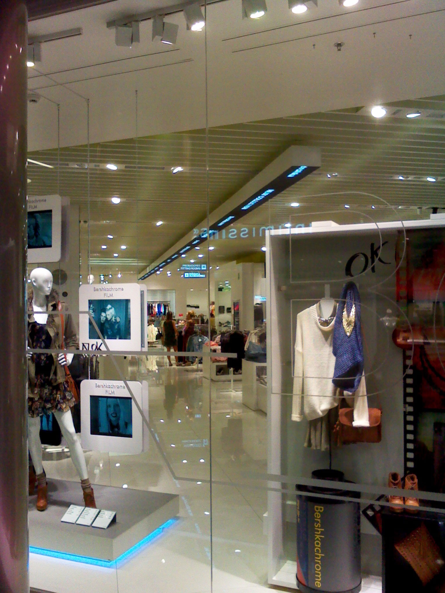 Nova tenda Bershka en Marineda City A Coruña Inditex Galiza